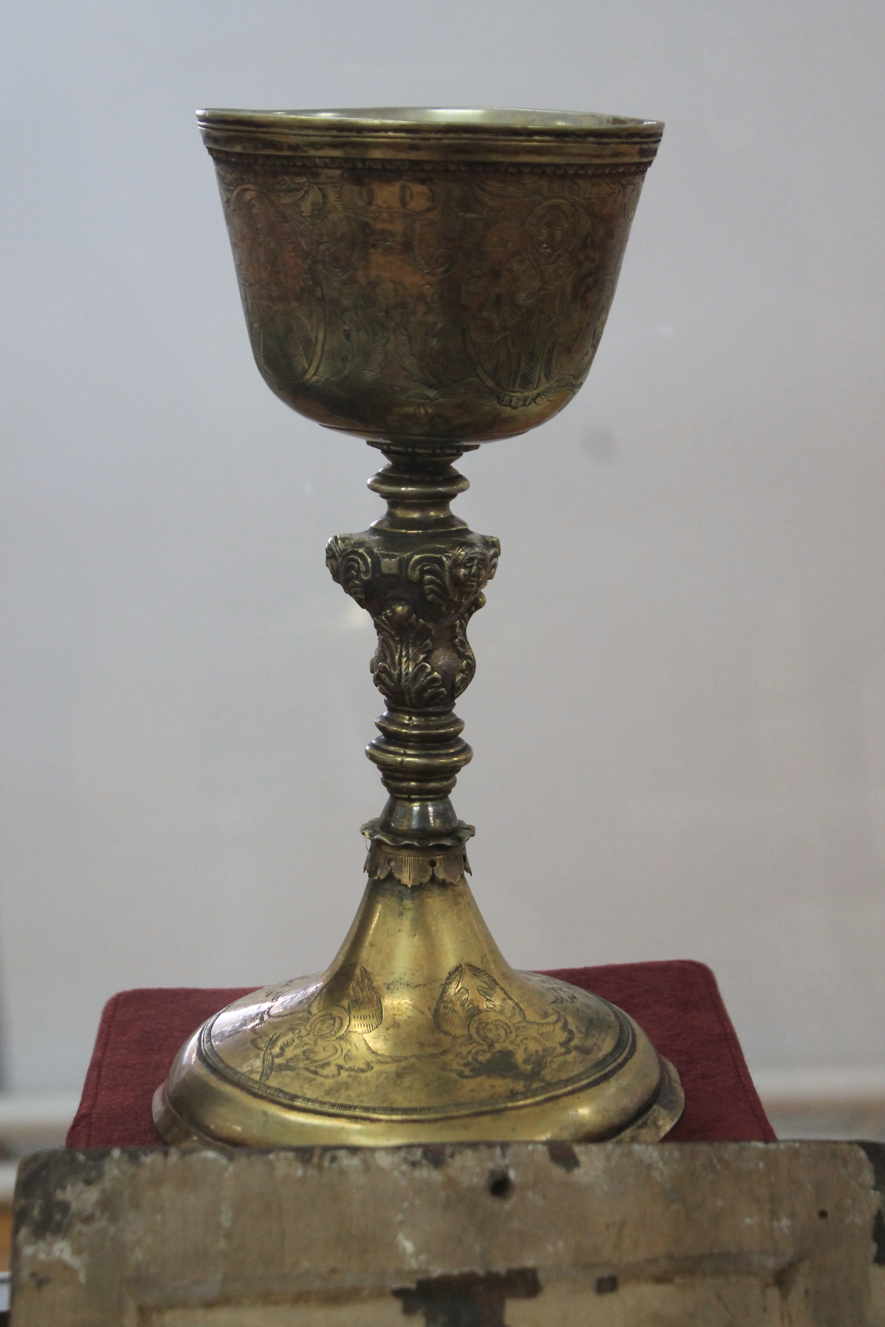 Crkvena riznica